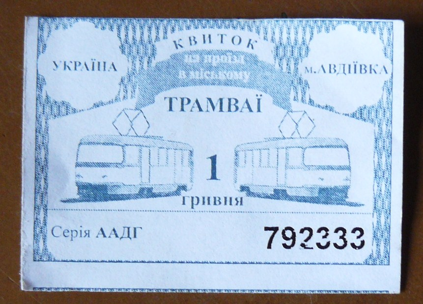 Bilet tramwajowy - Avdiivka.